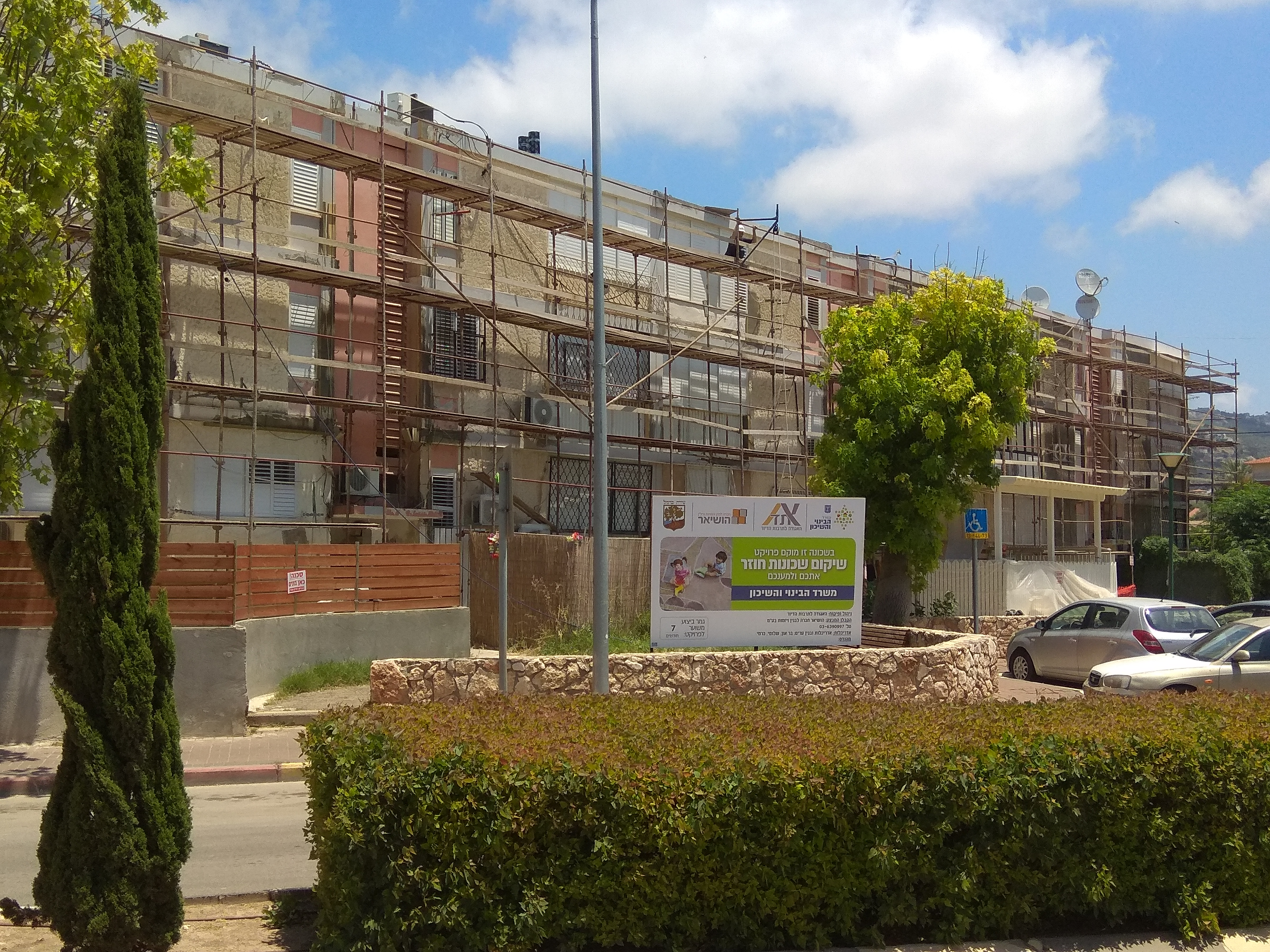 שיפוץ בניין במסגרת פרוייקט שיקום שכונות בטירת הכרמל, 2018